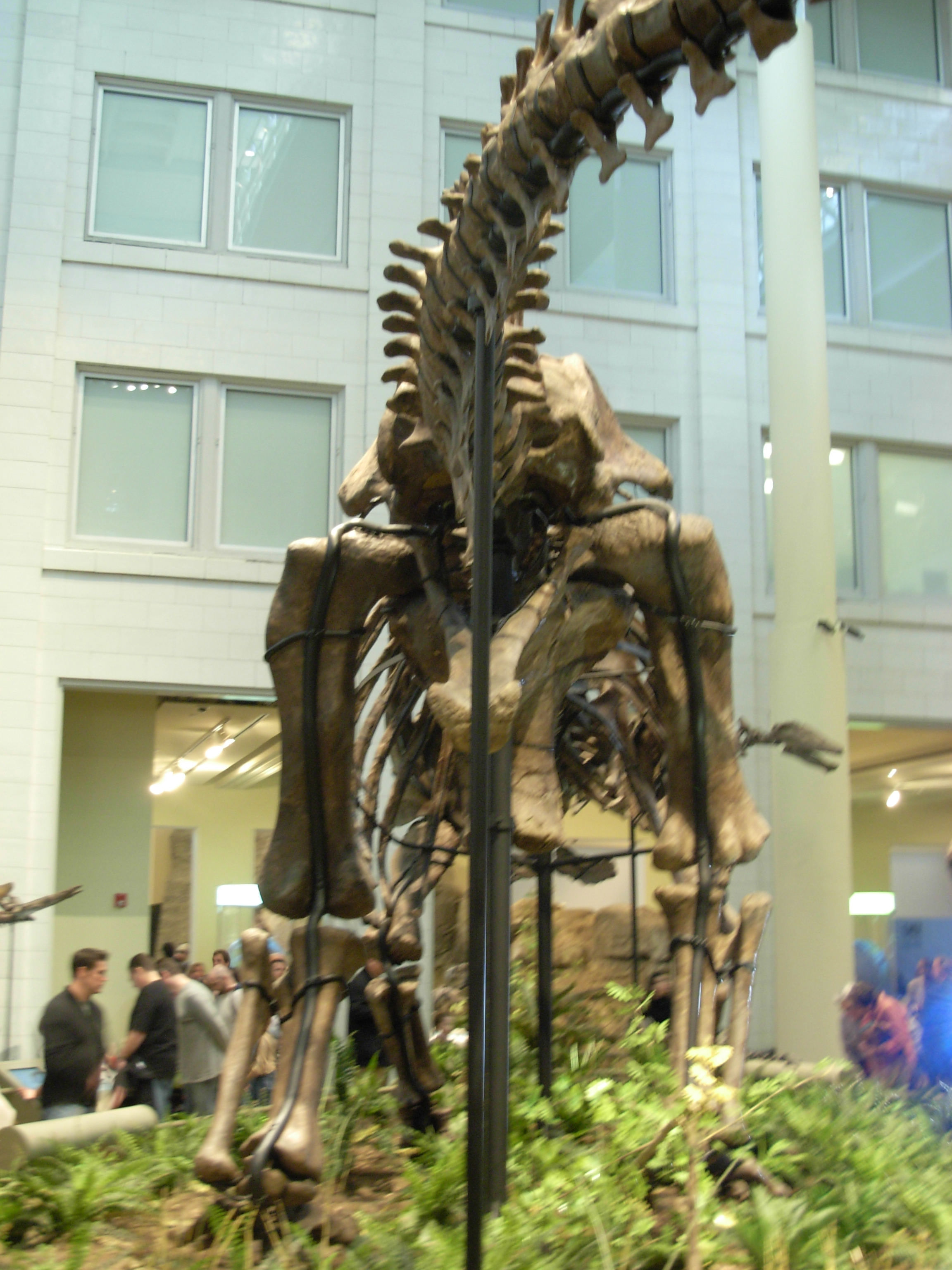 Apatosaurus